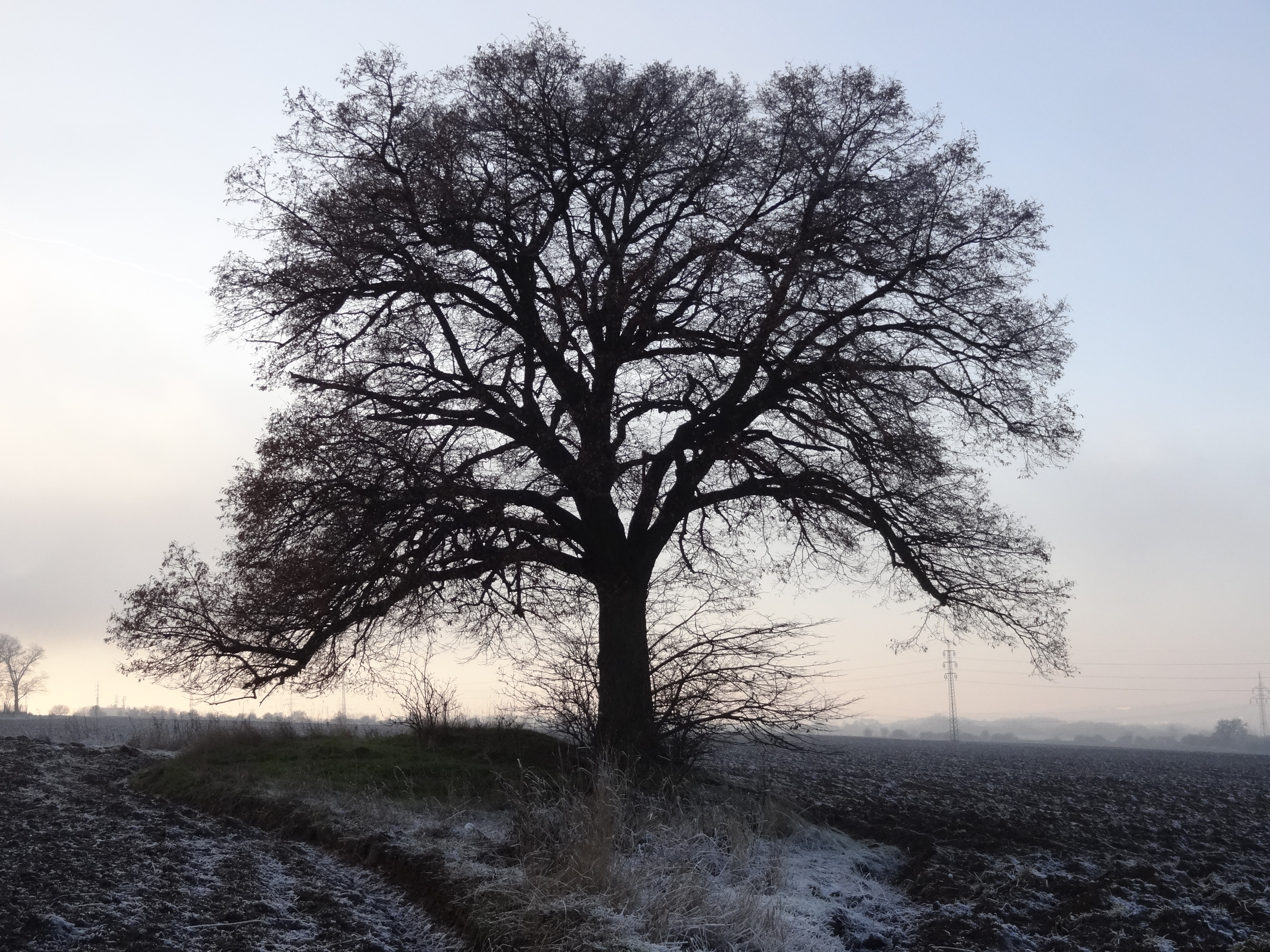 Holyně - památná lípa srdčitá v polích mezi Holyní a Slivencem